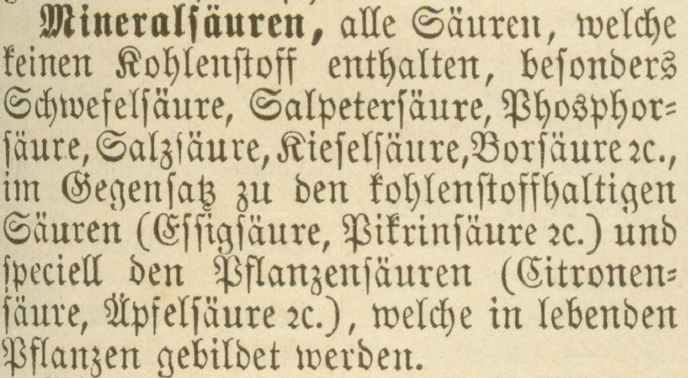 Scan aus Lexikon der angewandten Chemie